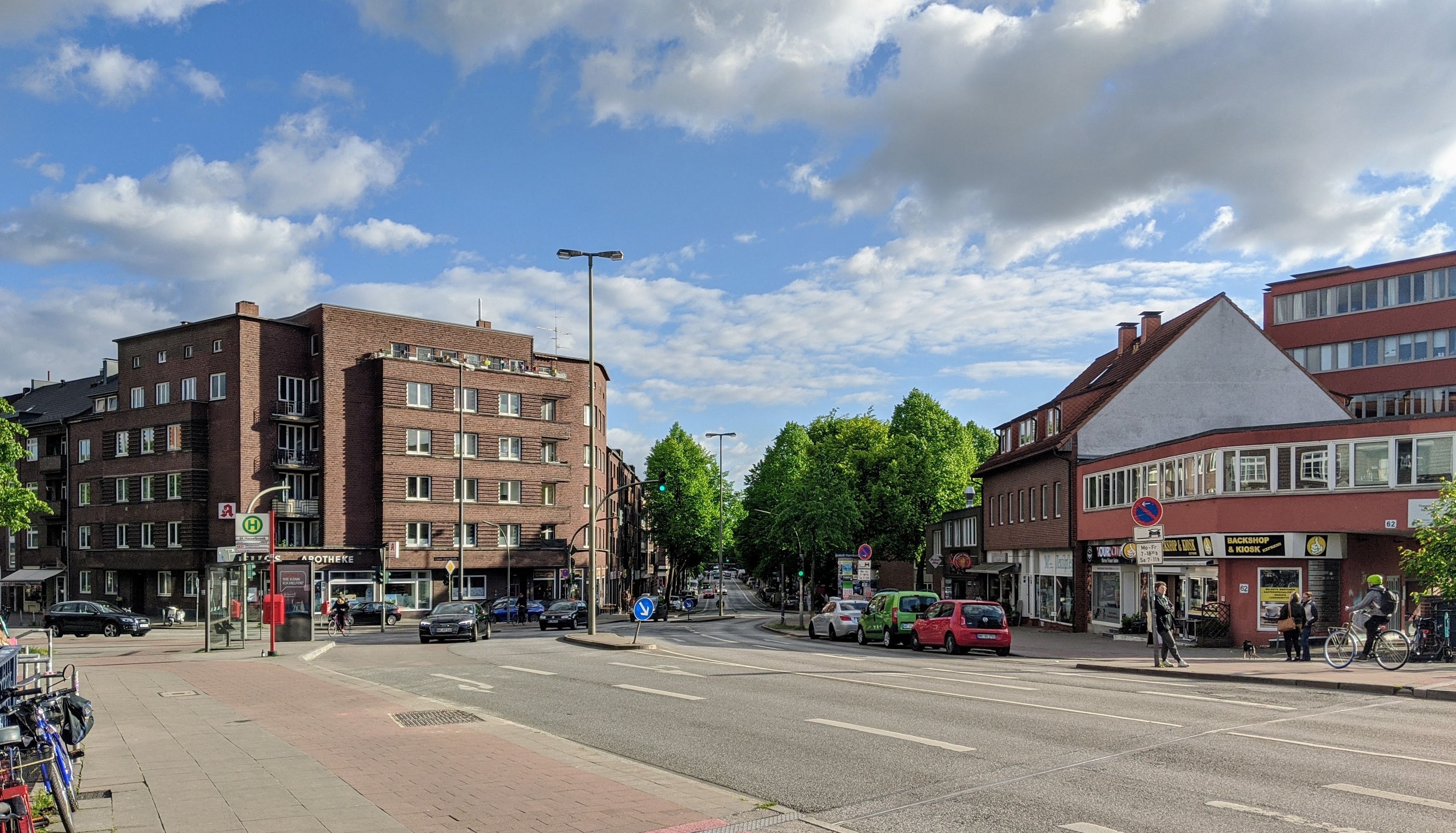 Hammer Steindamm in Hamburg-Hamm, Blick vom Bahnhof Hasselbrook in Richtung Süden, links abzweigend die Caspar-Voght-Straße mit z.T. denkmalgeschützten Backstein-Wohnhäusern aus den 1920er Jahren, rechts gemischte Wohn- und Gewerbebauten aus der Zeit nach dem Zweiten Weltkrieg